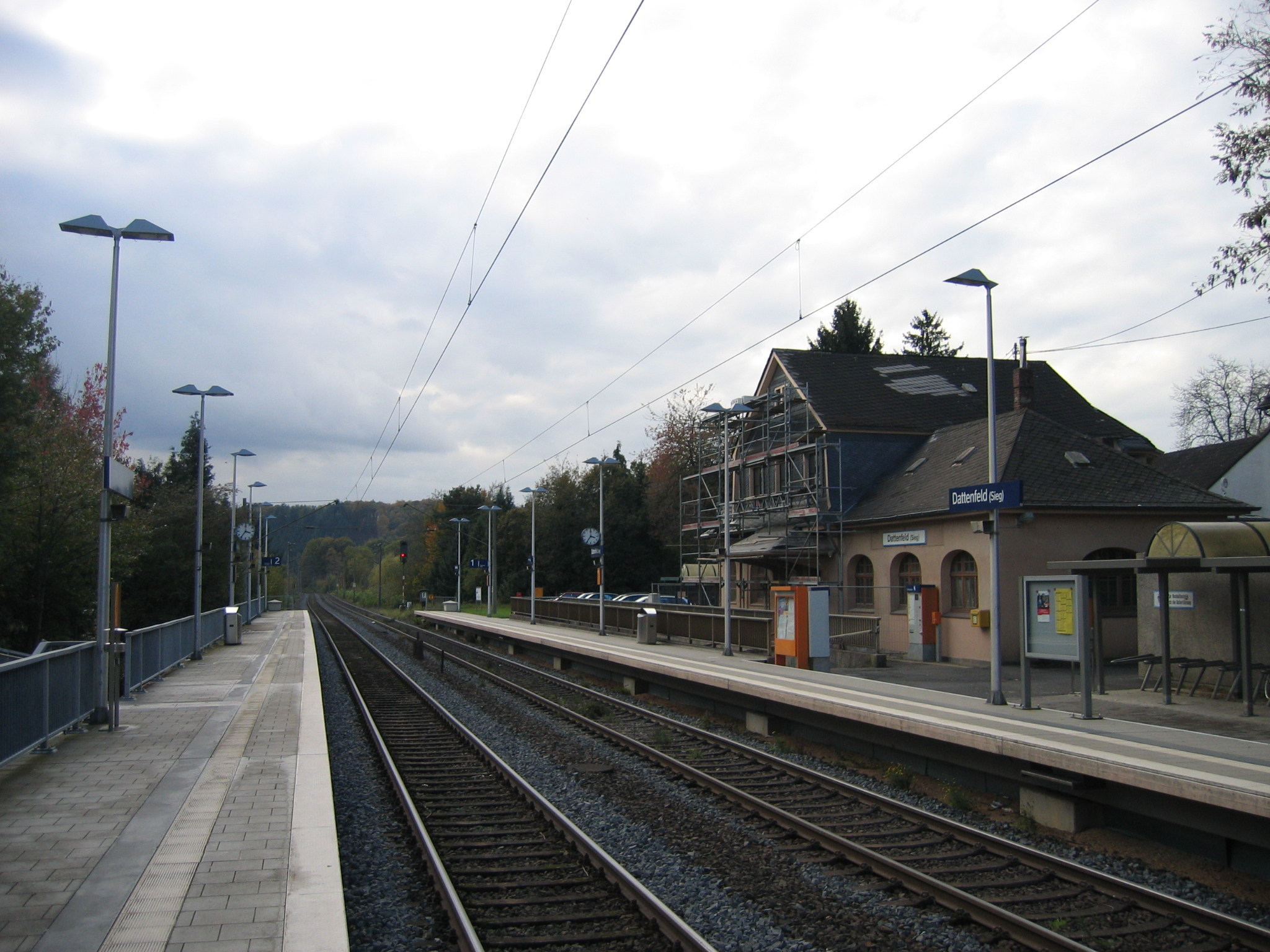 S-Bahnhof Dattenfeld an der Siegstrecke. Die Station befindet sich im Gemeindeteil Wilberhofen.